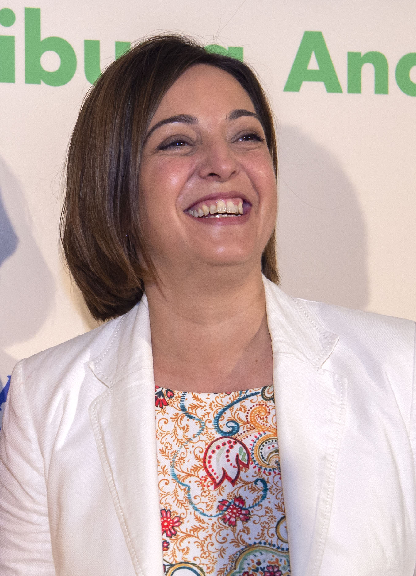 18.07.18 Alcaldesa de Córdoba. Forum Europa 2